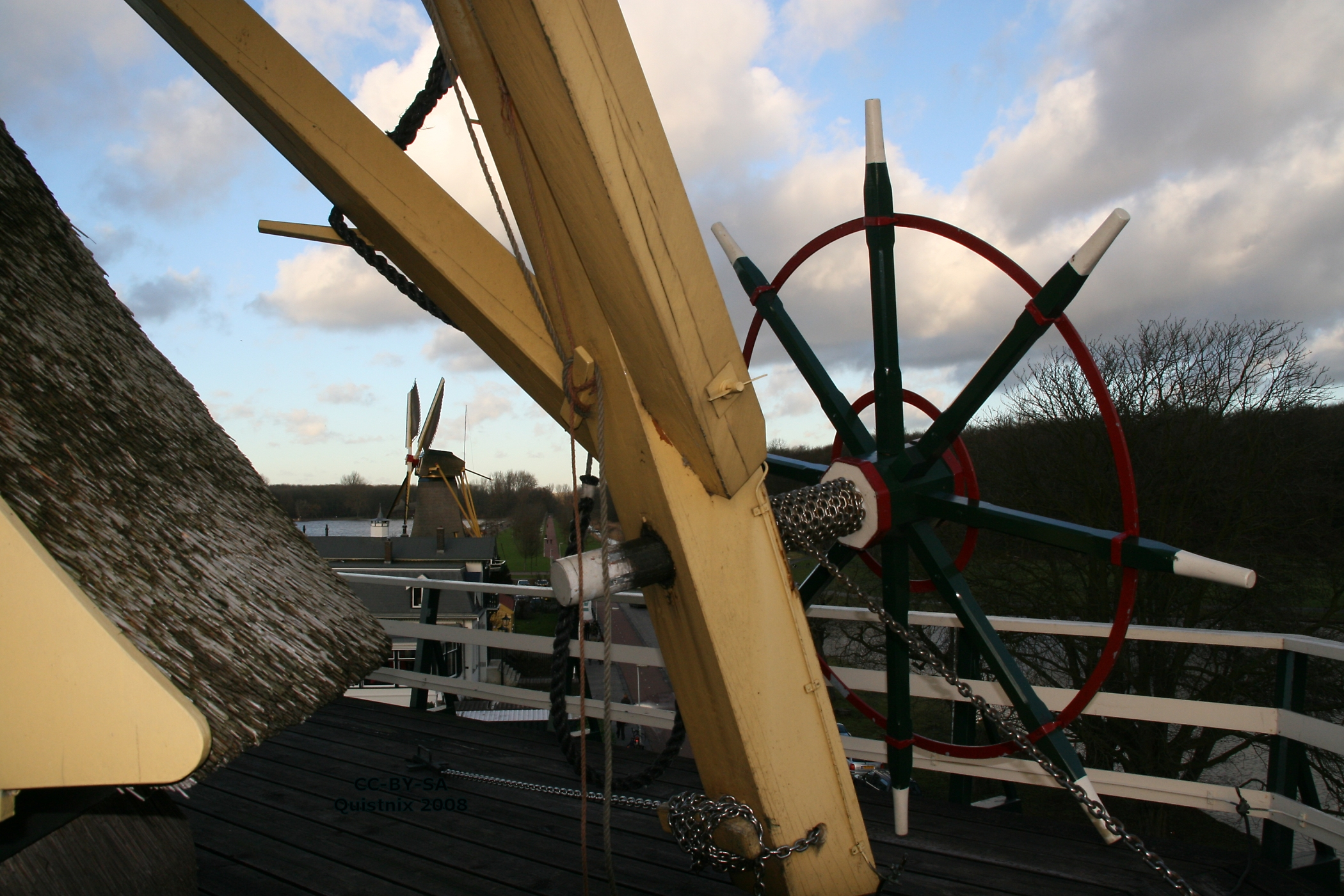 Rotterdam-Kralingen, windmolen De Ster: zicht op De Lelie vanaf de stelling